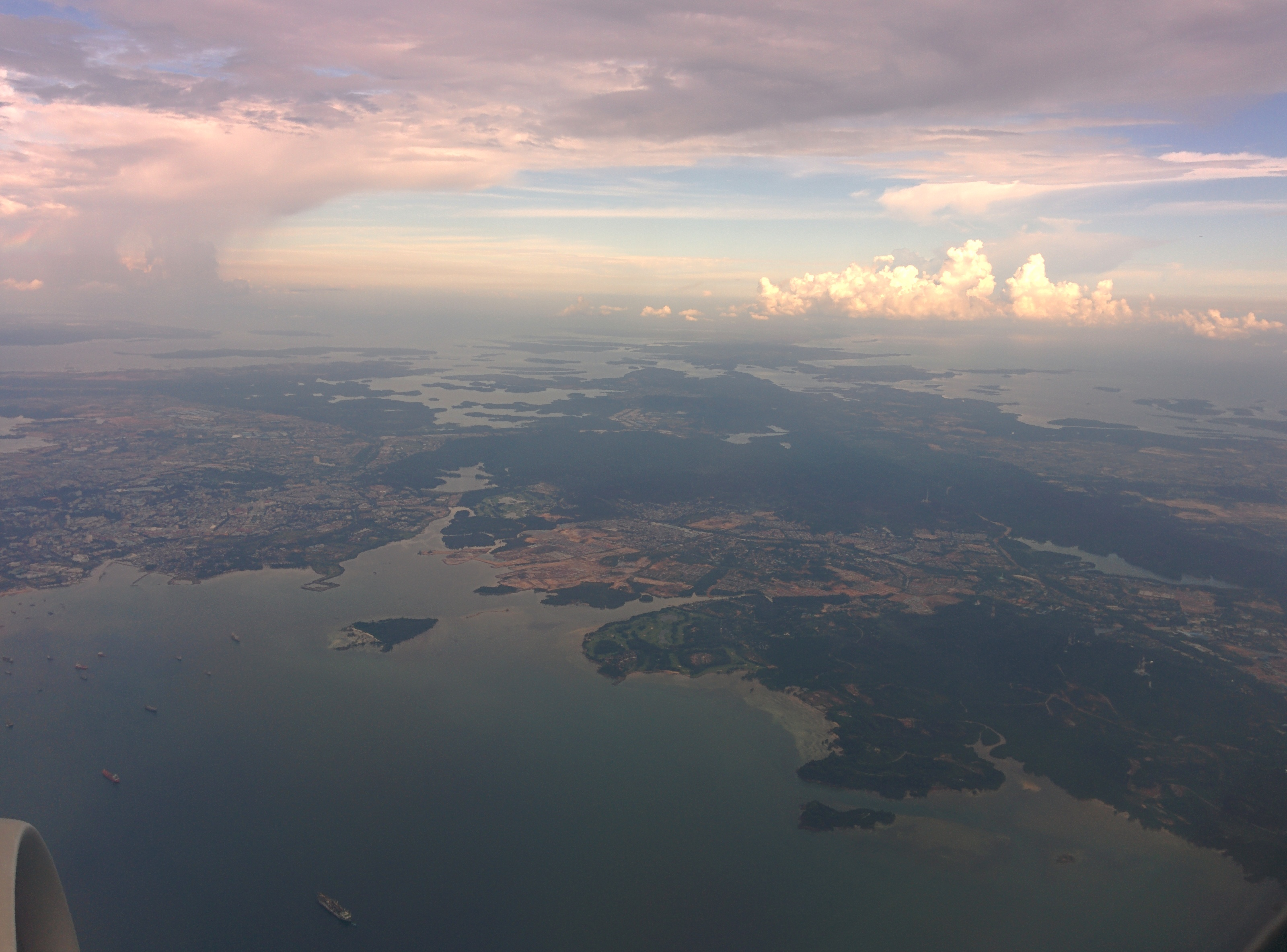 Unnamed Road, Kota Batam, Kepulauan Riau 29411, Indonesia